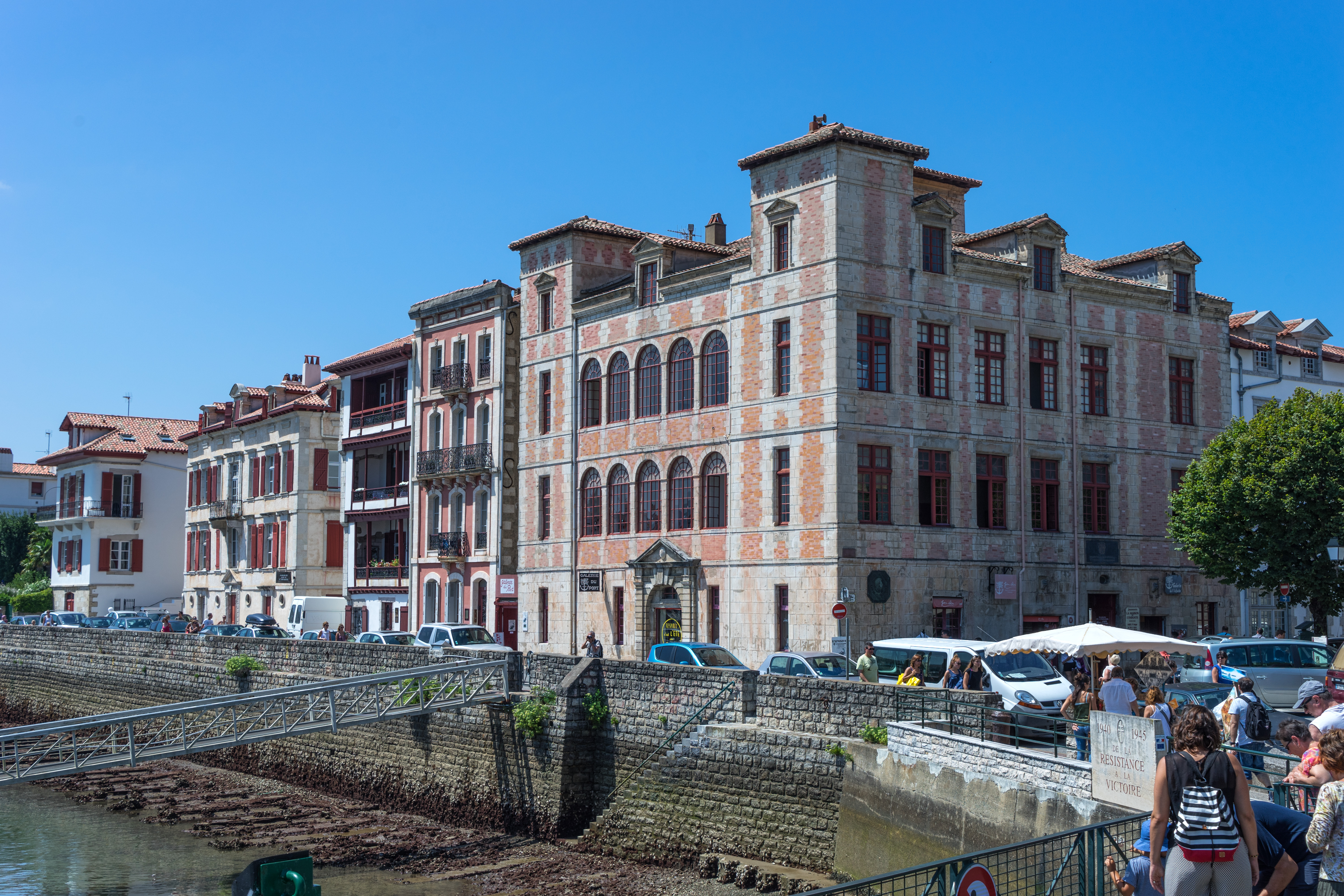 Saint Jean-de-Luz - Maison de l'Infante